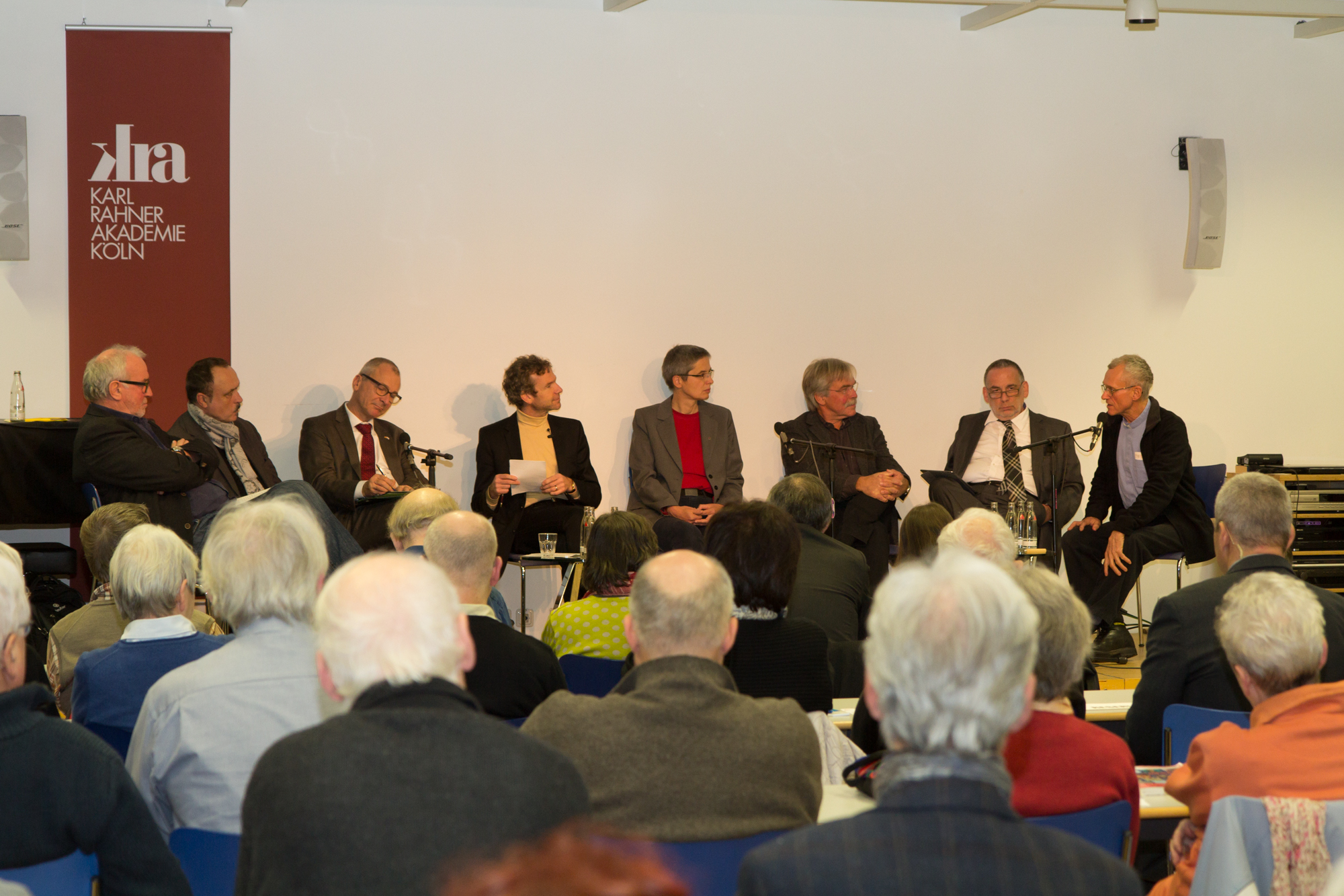 „Der Erinnerung wert? Walter Herrmann, die Klagemauer, der Antisemitismus und die Aufgabe historischer Archive“ Podiumsgespräch in der Karl-Rahner-Akademie in Köln zum Umgang mit dem Nachlass des Aktivisten – den Tafeln der „Kölner Klagemauer“.